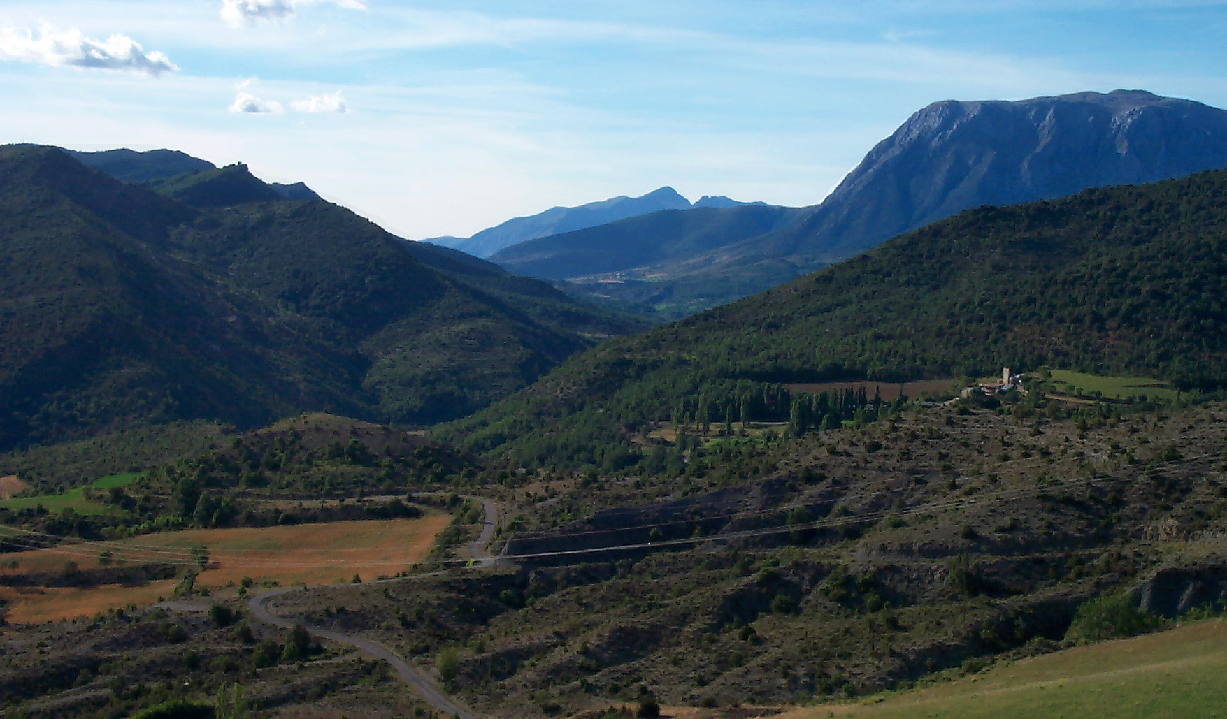 Imatge feta des de Riguala, a la Serra de Sis (o Serra del Cis), del municipi d'Isàvena. El llogaret que es veu baix a la dreta és El Barri de Serradui. A l'esquerra es veu la serra del Jordal (i Rin de la Carrasca dalt), que arriba al riu Isàvena. Darrere de Sis i a la dreta podem veure El Turbó. Entre El Jordal i El Turbó, La Vall de Lierp, i les terres de Vilacarle i Tor-la-ribera; i al fons El Cotiella.